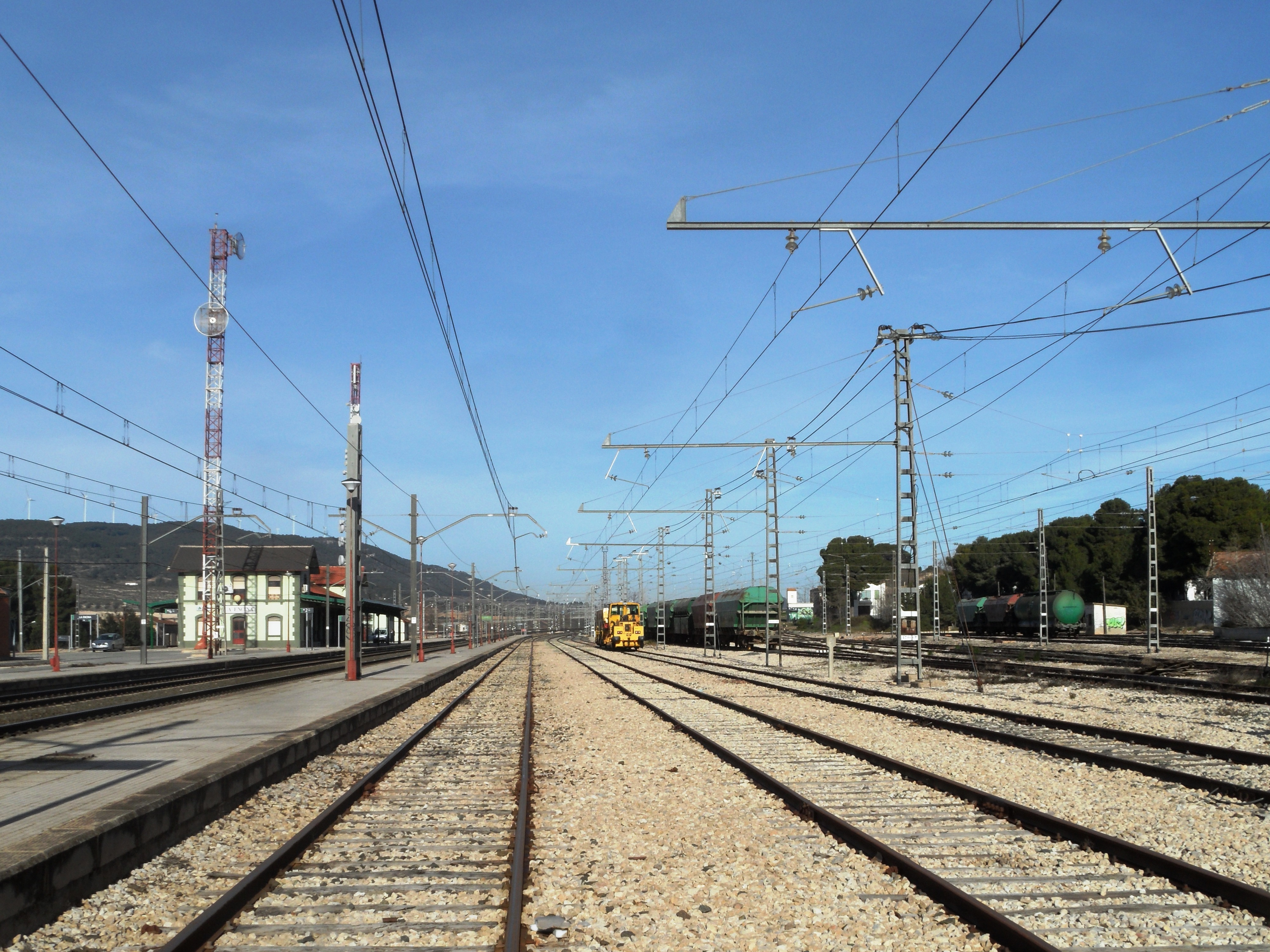 Vista general de la estación de la Encina y las vías; a la derecha se distingue el caserío del pueblo.